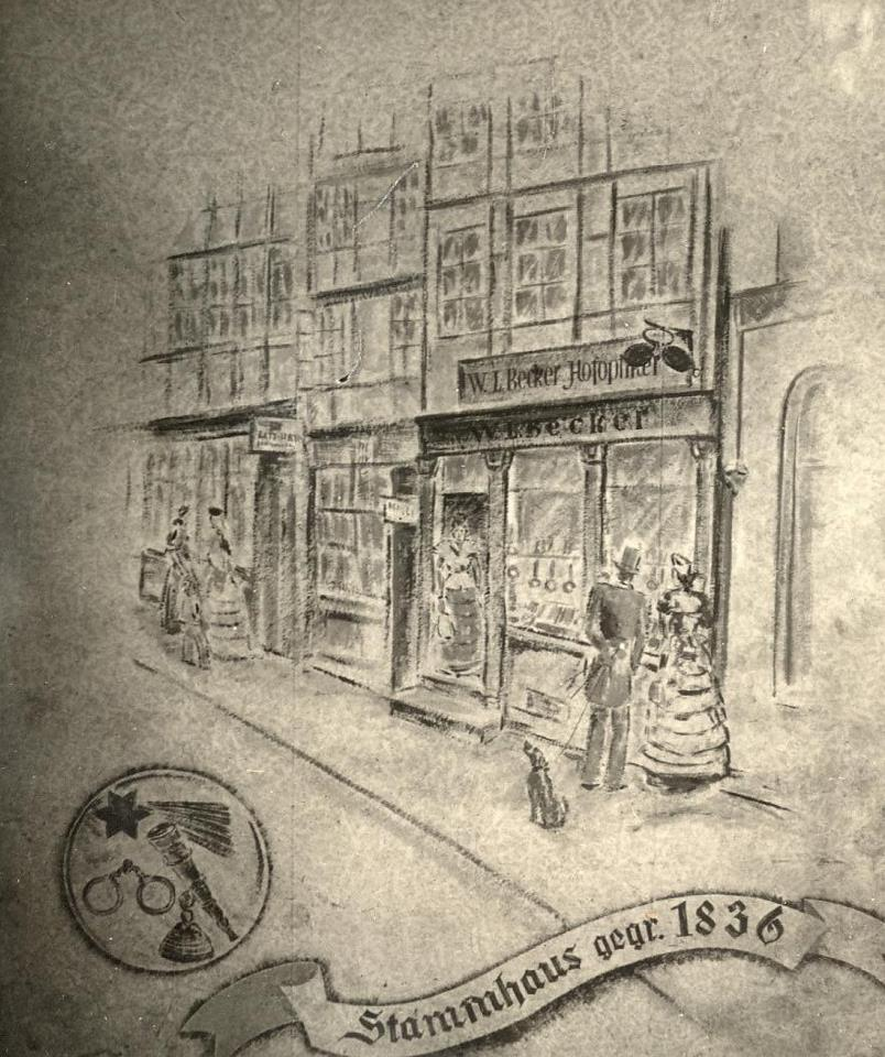 W. Ludwig Becker wurde im Jahr 1846 durch König Ernst August I. von Hannover der Titel eines Hofmechanikers und -optikers verliehen